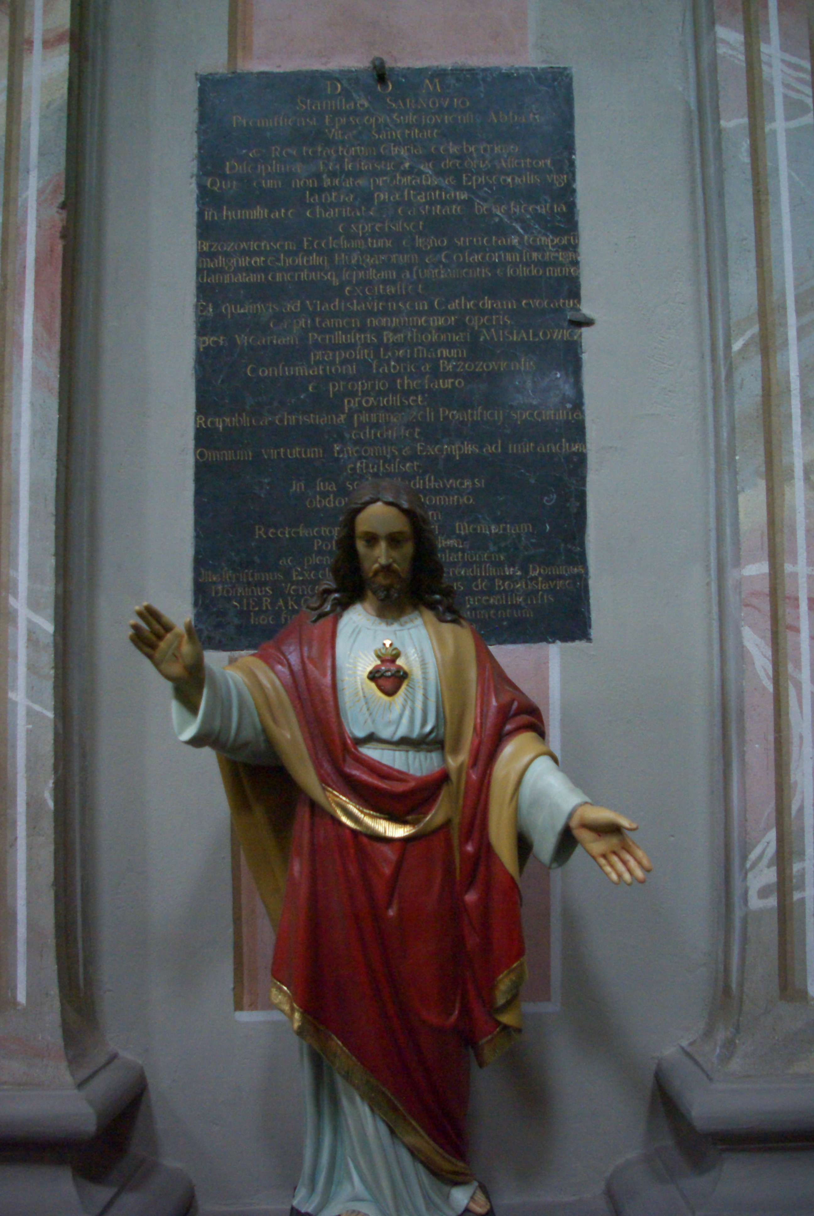 Epitafium Stanisława Sarnowskiego w kościele Przemienienia Pańskiego w Brzozowie.